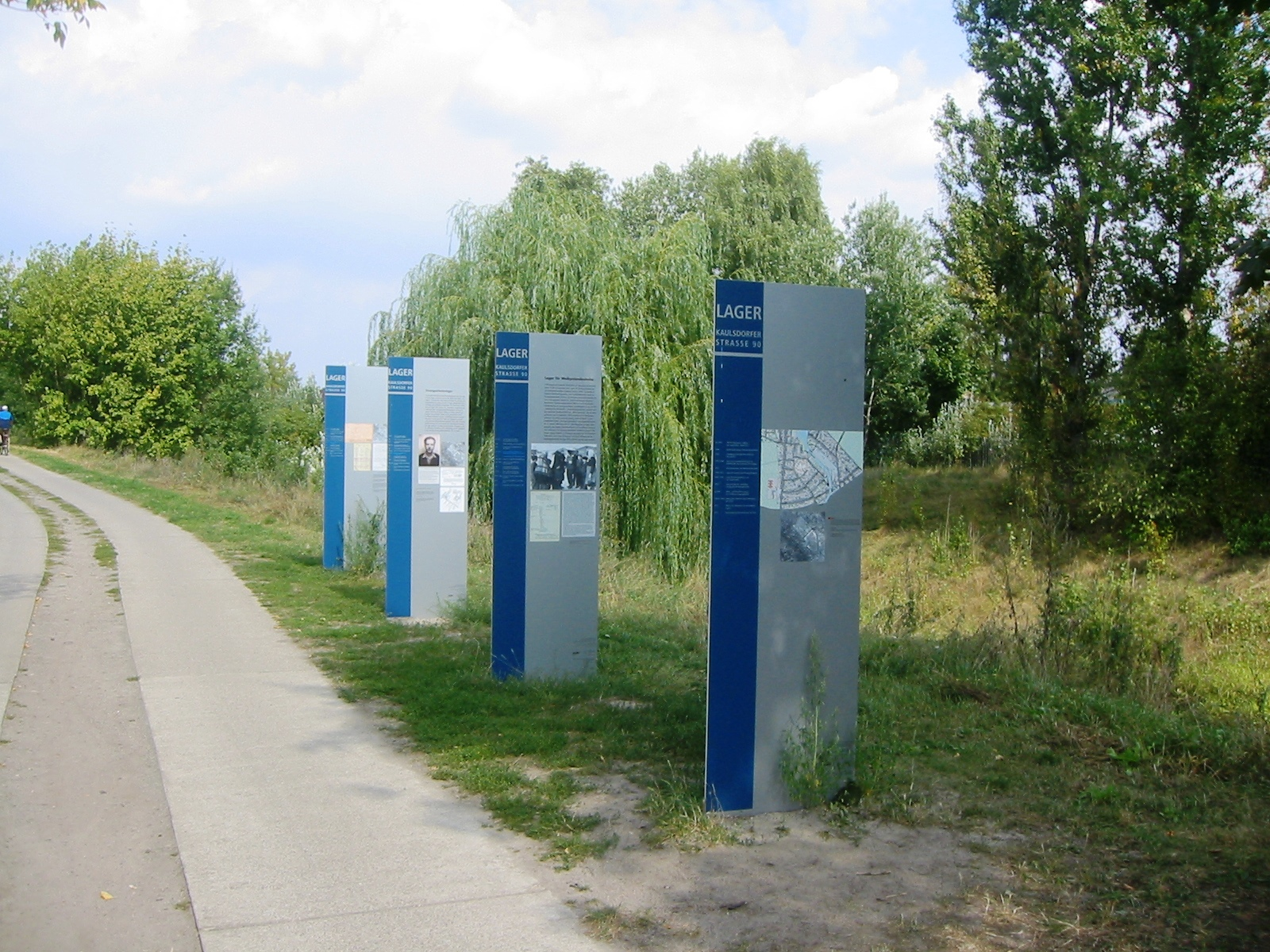 Informationsstele am ehemaligen Lager. Die Stele wurde vom Bezirksamt Marzahn-Hellersdorf von Berlin unter der Leitung von Christa Hübner, Dorothee Ifland, Lutz Prieß und Daniela Schnitter aufgestellt.